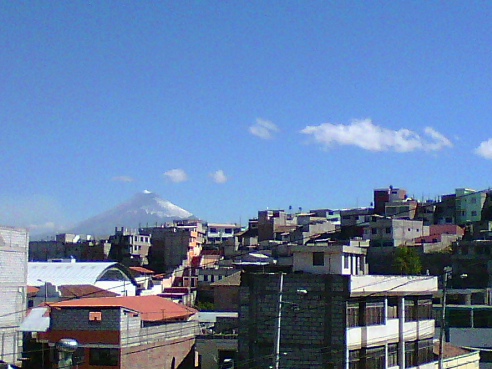 Volcán Cotopaxi visto desde Latacunga.